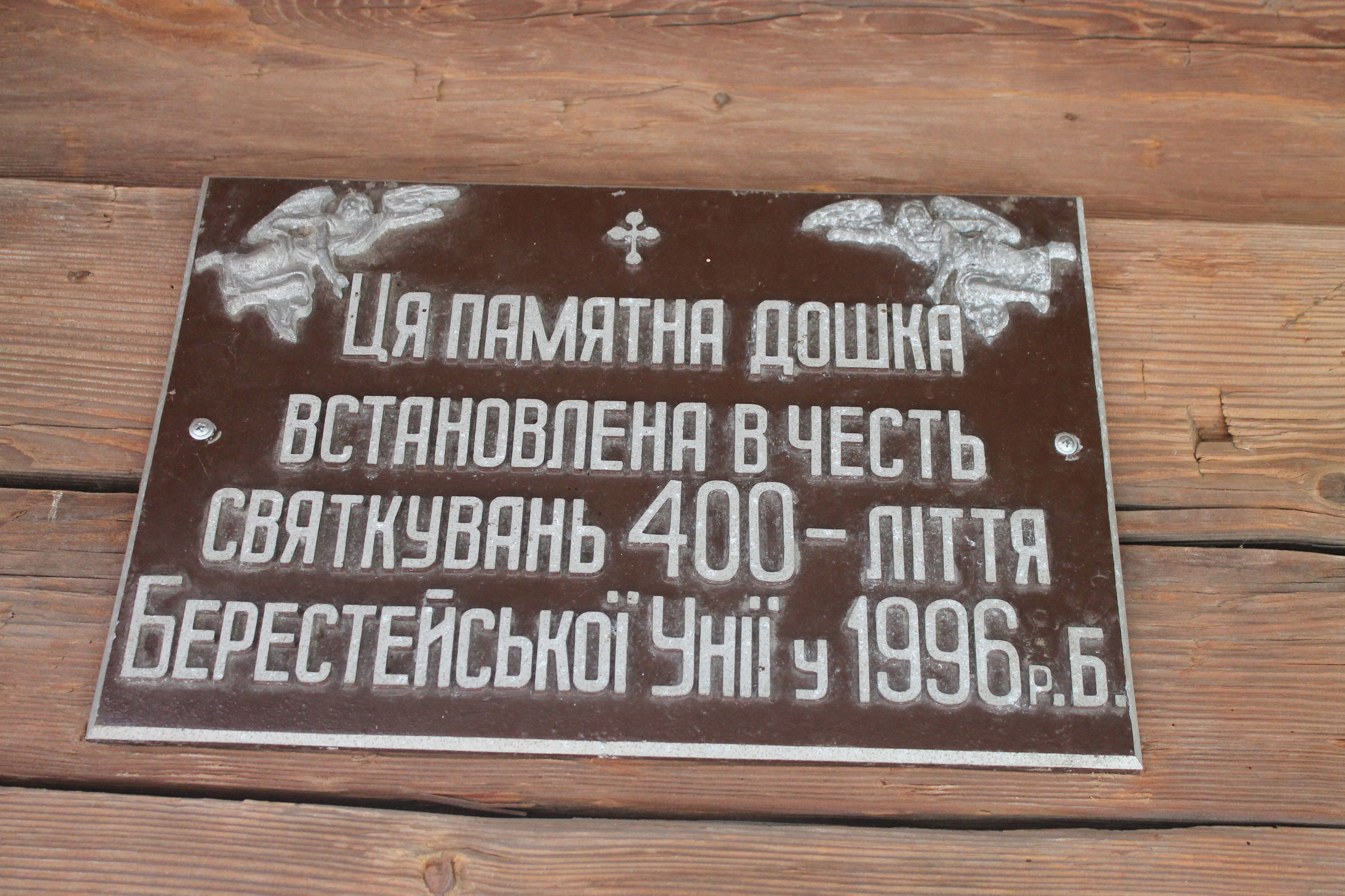 Церква Св.Параскеви (дер.), Сколе, вул.Шевченка